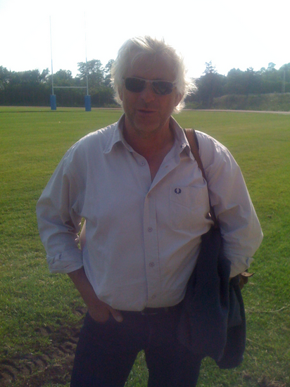 Roger Milhau au stade de St Josep à Marseille